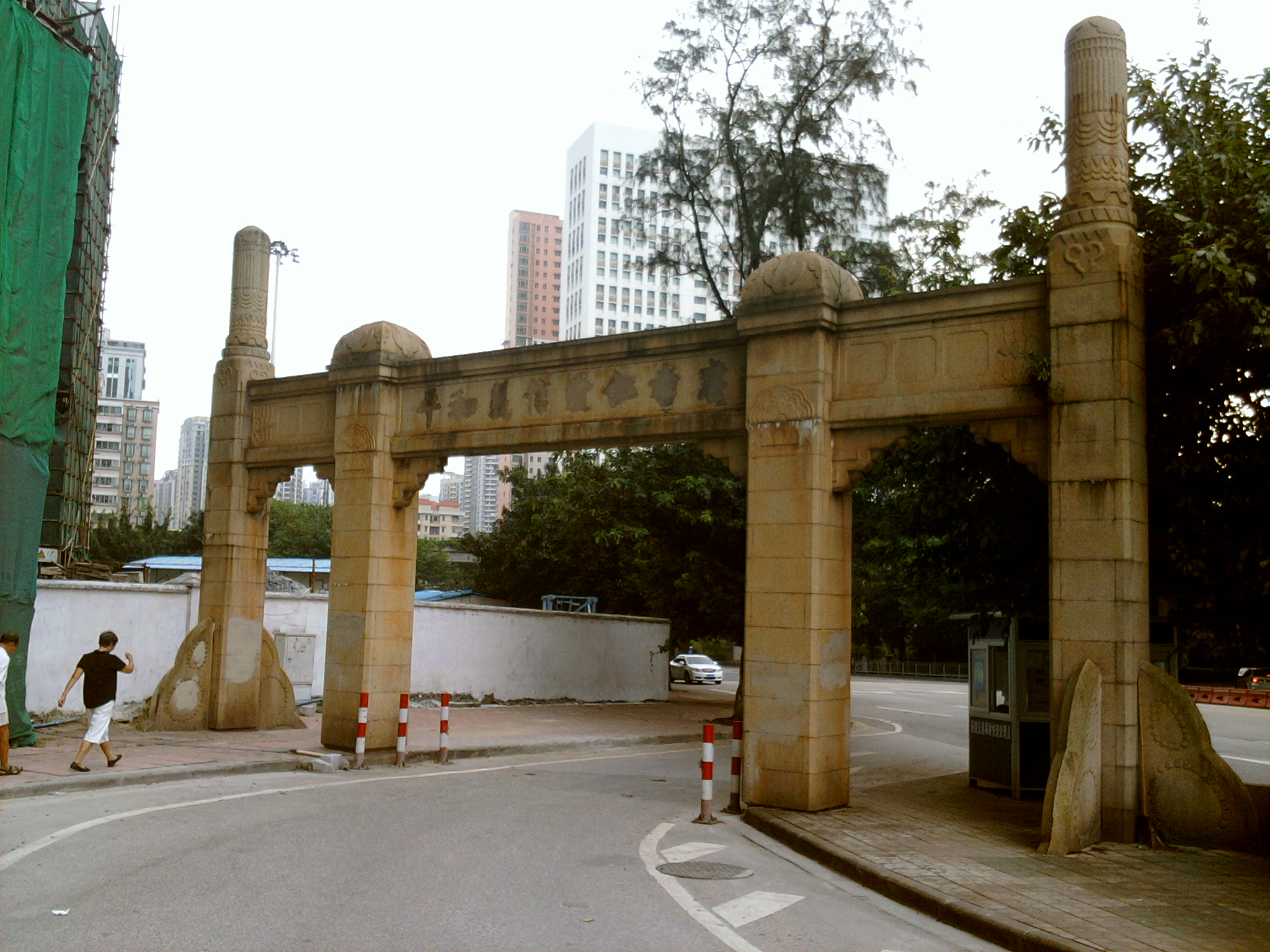 文化大革命期間塗抹在國立中山大學西門牌坊背面的「忠孝 仁愛 信義 和平」字體上的英泥。牌坊由國立中大首任校長鄒魯題字。